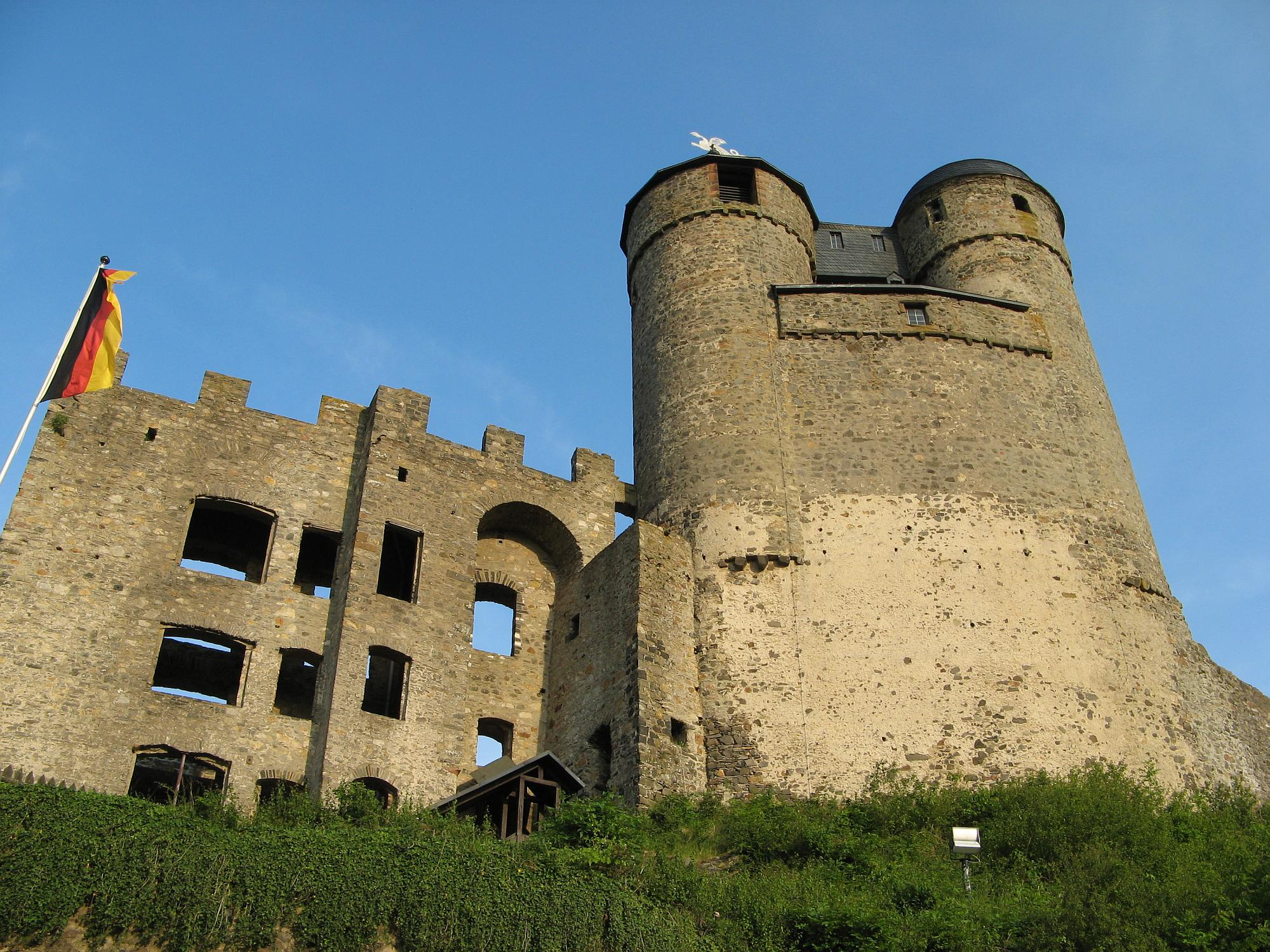 Burg Greifenstein - Ansicht der Vorderseite